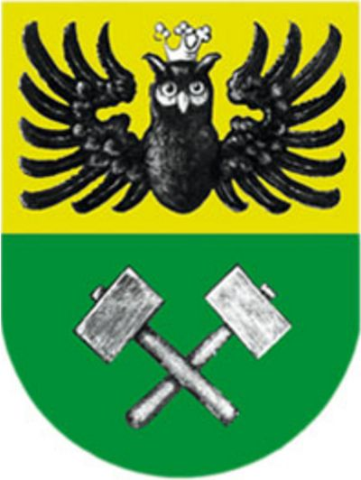 Das Wappen ist ein von Gold und Grün geteilter Schild; im oberen Feld eine schwarze, goldgekrönte Eule mit ausgebreitetem Flug, im unteren Feld zwei schräggekreuzte silberne Hämmer. Die Eule stammt aus dem Wappen der Grafen Saurau. Die Hämmer weisen auf die Bedeutung der einstigen Hammerwerke hin, die in der Ligister Gegend bis in das 19. Jahrhundert hinein einen wichtigen Wirtschaftsfaktor darstellten.